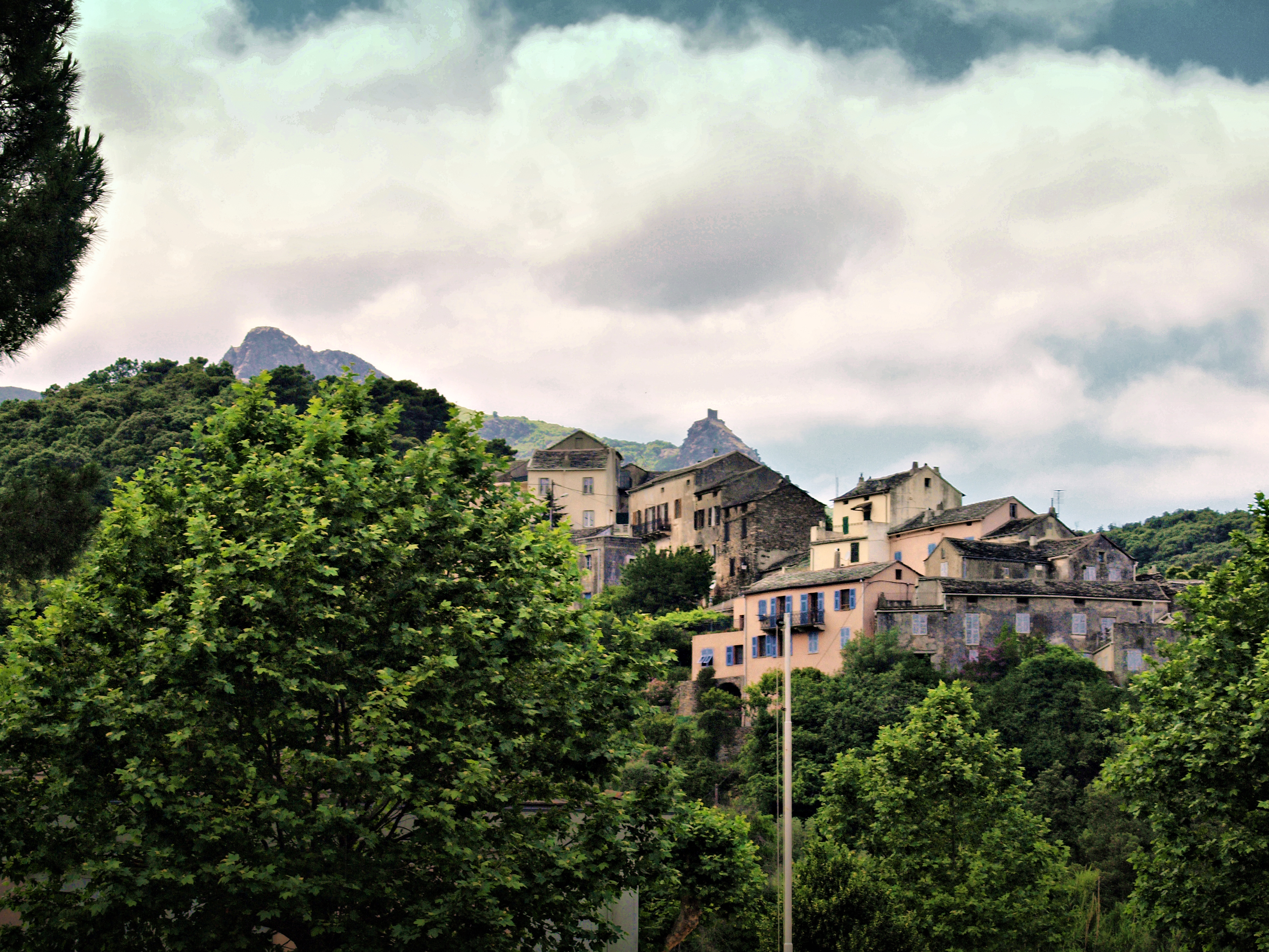 Luri (Corse) - Poggio. En arrière, la tour de Sénèque